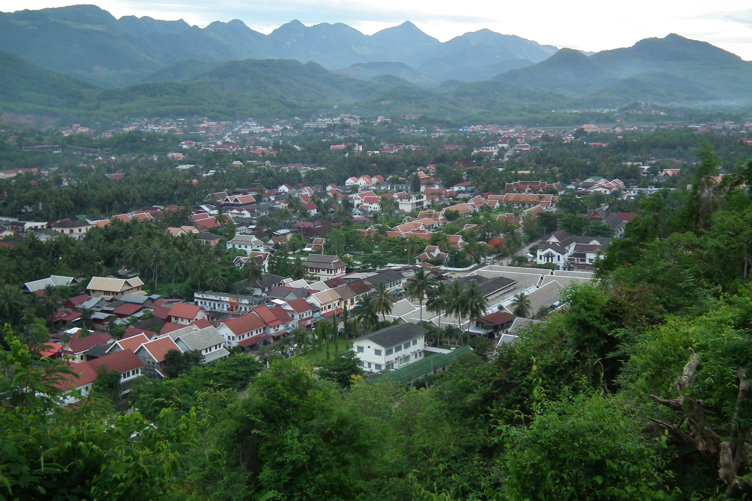 Phou si Luang Prabang Laos プーシーの丘 ラオス・ルアンプラバーン